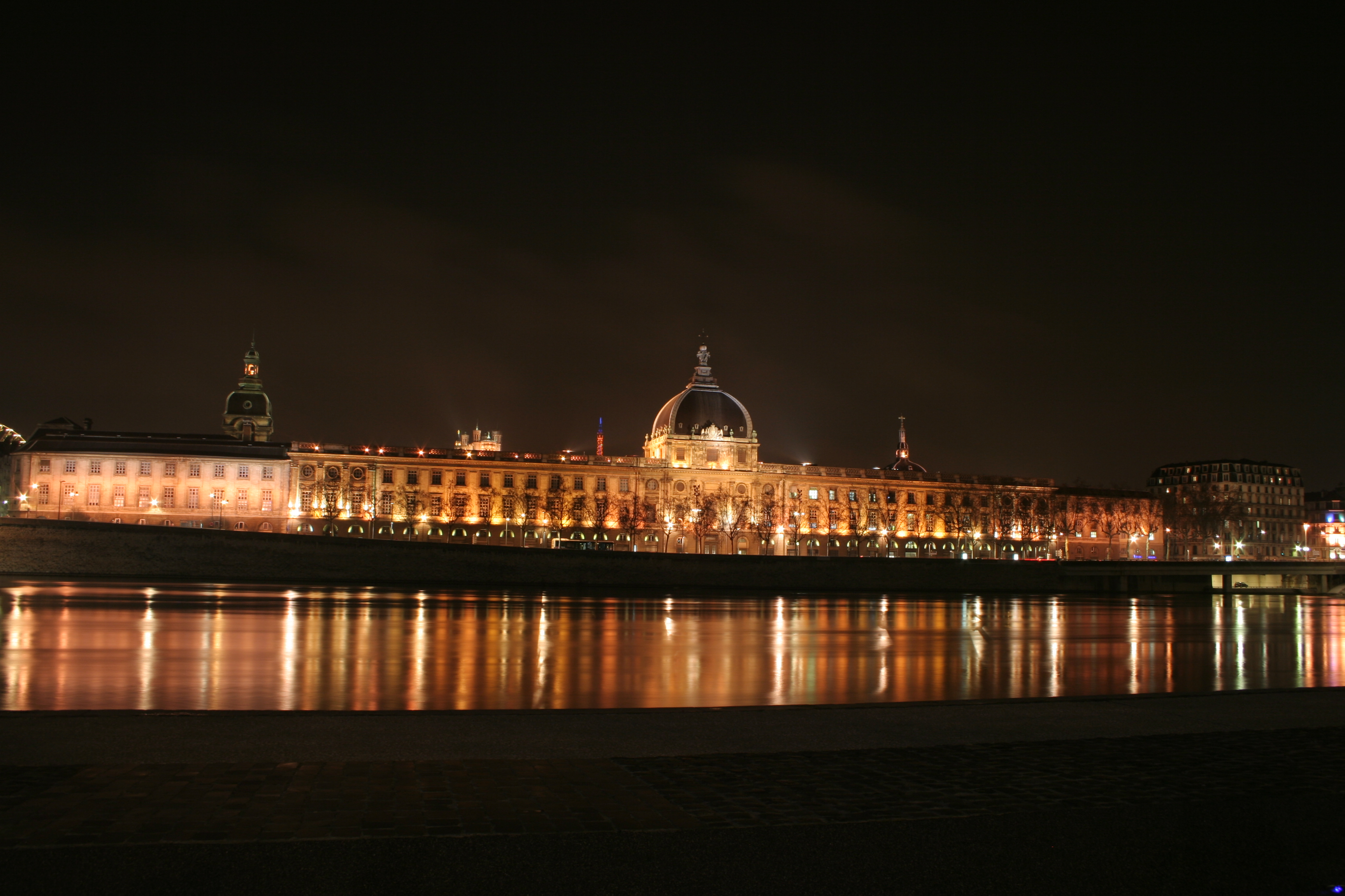 Hôtel-Dieu vu du quai Victor Augagneur